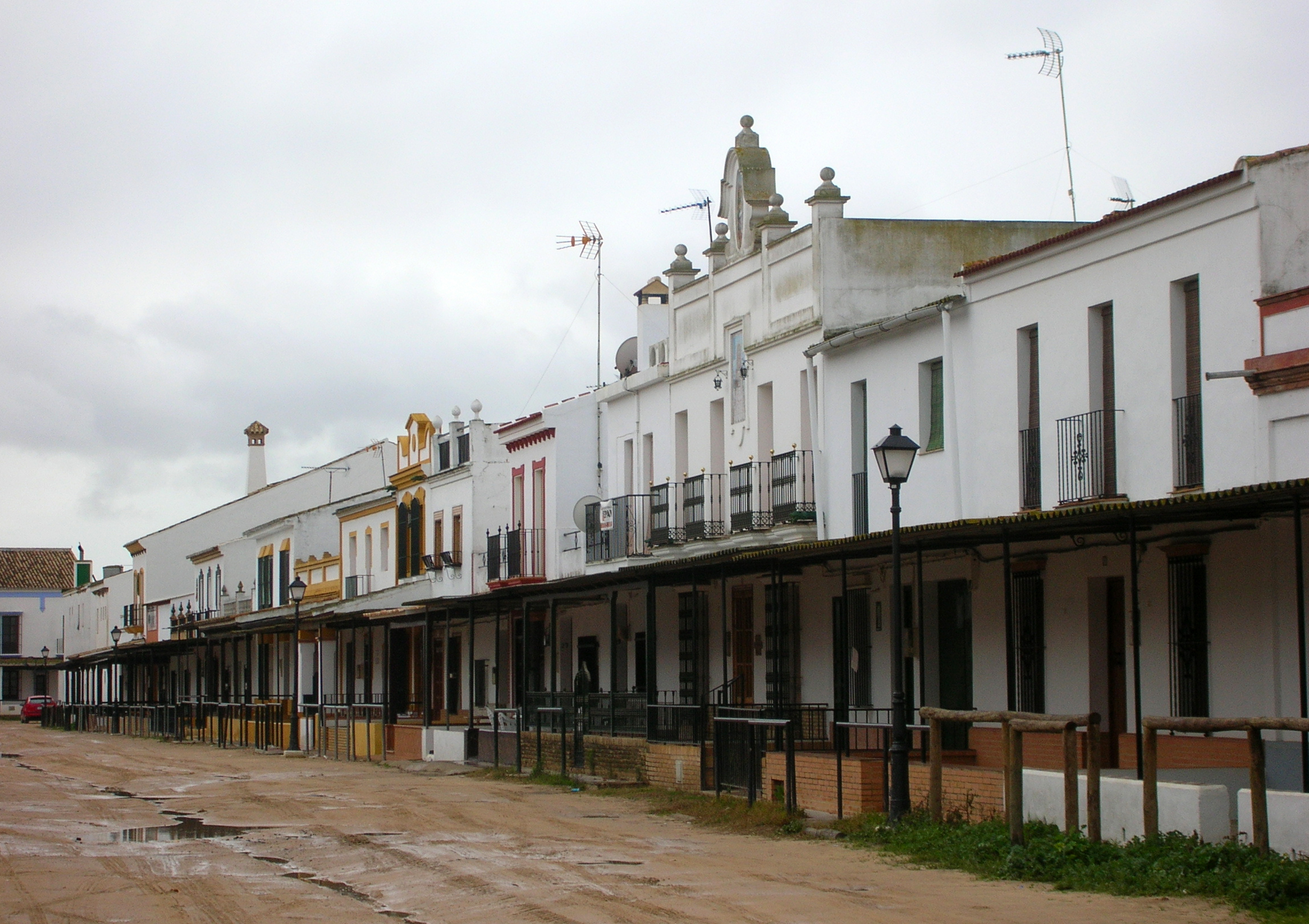 Rue du village d'El Rocío, commune d'Almonte (Espagne)